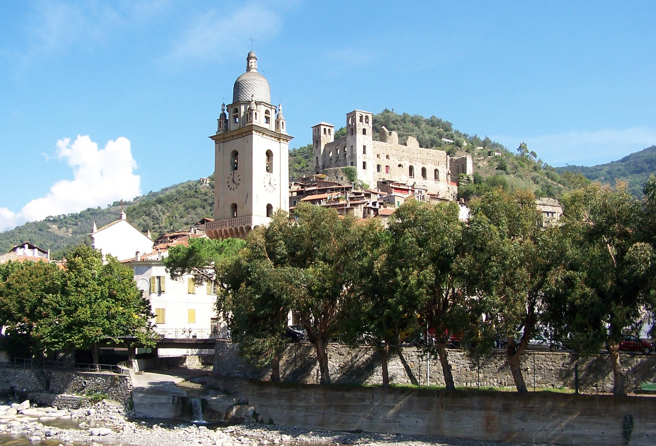 Dolceaqua in Italy